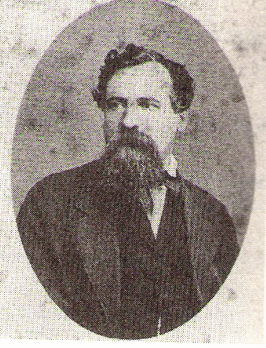 Fonte: A. Sanchirico, P. Lotito, Montemurro, il tempo e la memoria, Rocco Curto editore, 1994.